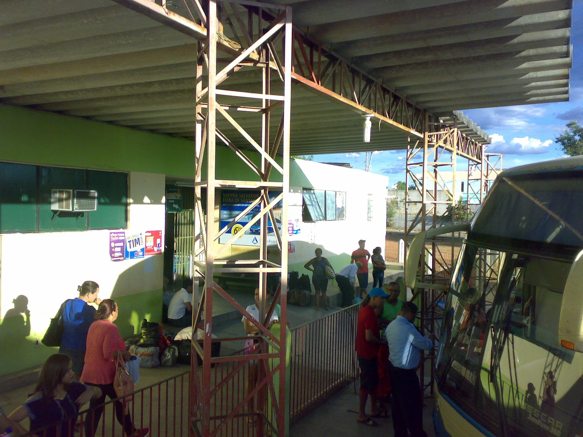 Vista do Terminal Rodoviário da cidade de Bom Jesus da Lapa. Foto de 31 de janeiro de 2017.